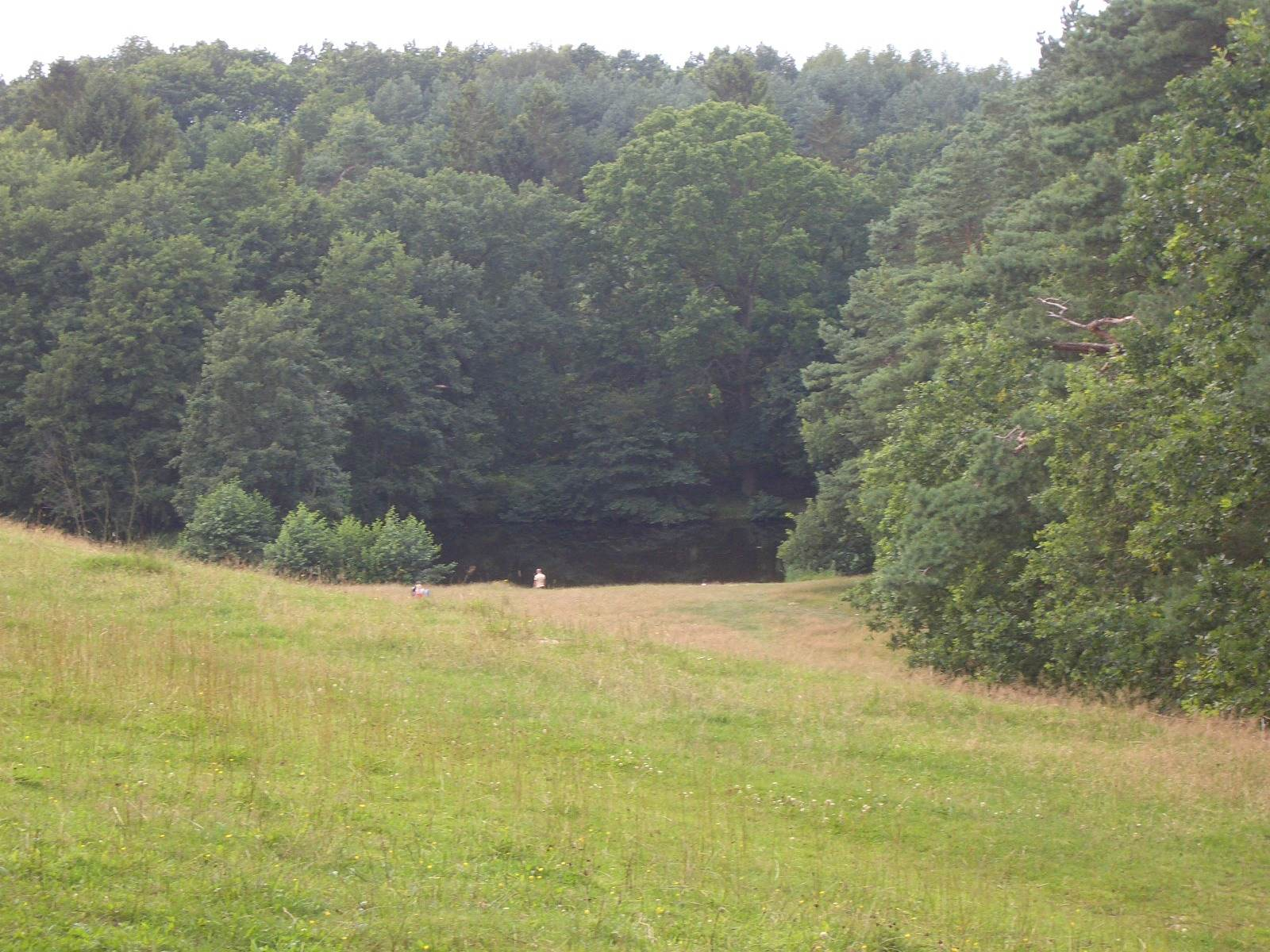 Rostocker Heide und Naturschutzgebiet Kösterbeck.